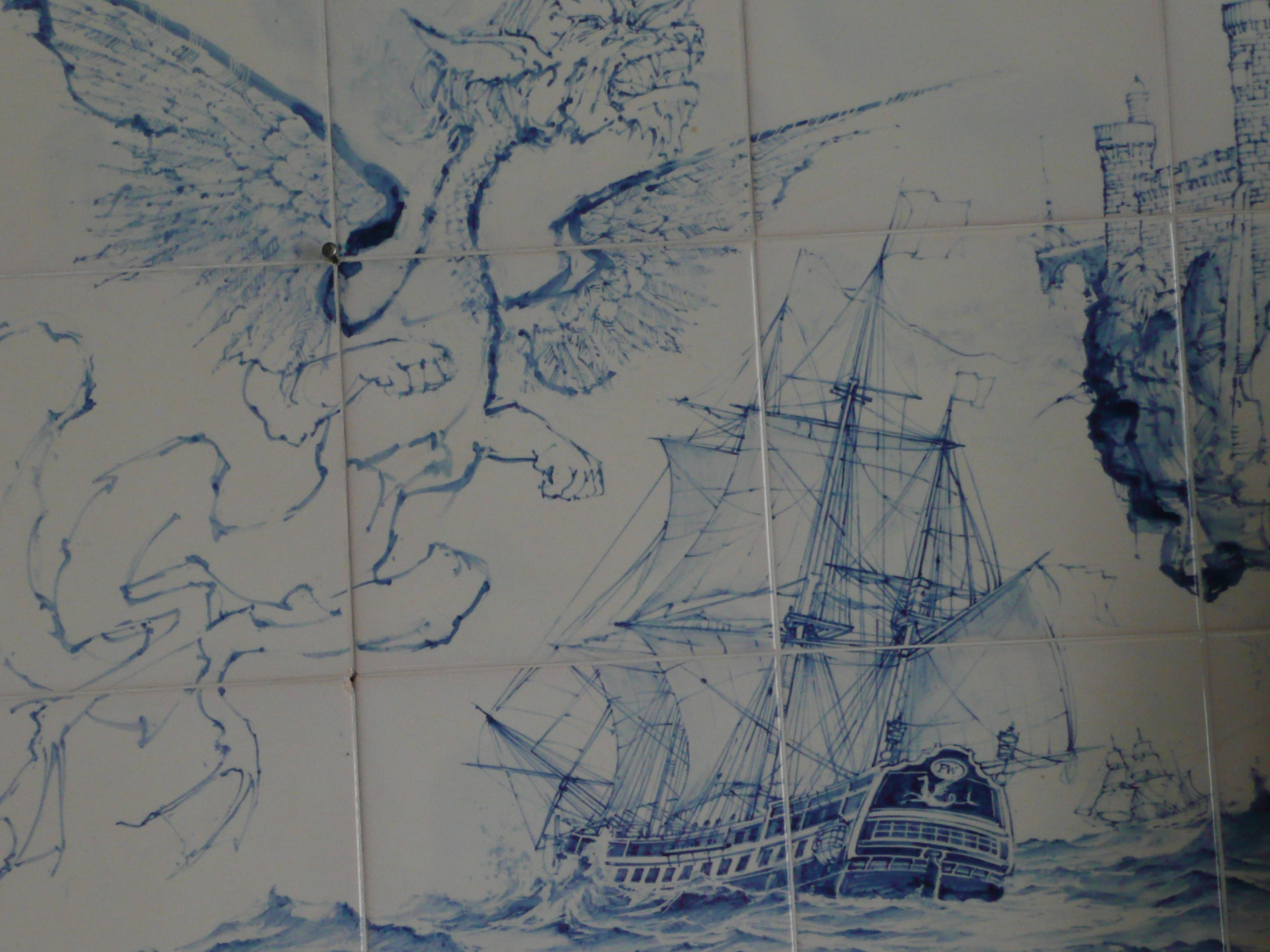 Hans-Peter Wirsing, "Hausdrachen", Fliesenbild, 1991, Ausschnitt